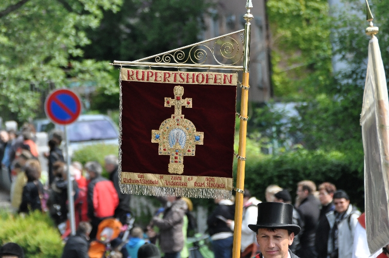 Bilder vom Blutritt in Weingarten 2012 Personality rights warningAlthough this work is freely licensed or in the public domain, the person(s) shown may have rights that legally restrict certain re-uses unless those depicted consent to such uses. In these cases, a model release or other evidence of consent could protect you from infringement claims.